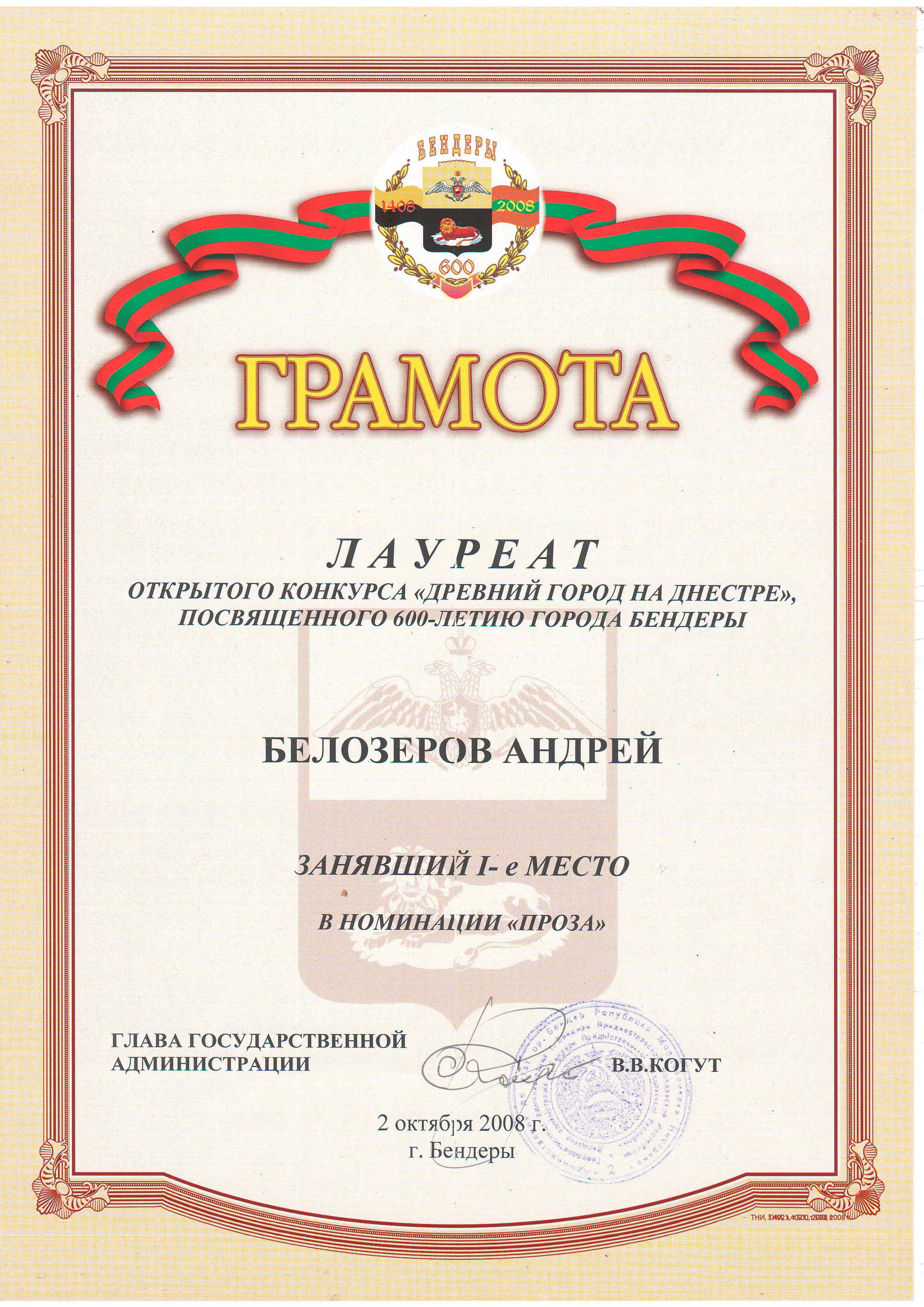 Грамота Андрея Белозёрова к 600 летию города Бендеры. 2008 год